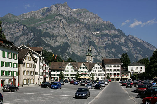 Landsgemeindeplatz von Glarus